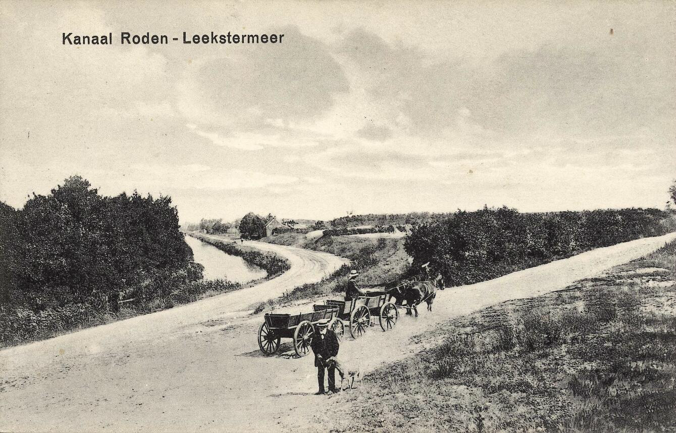 Deel van de Rodervaart op een VVV-ansichtkaart. Het betreft waarschijnlijk de bocht iets ten noorden van de haven met rechts langs de vaart de weg 'Aan de Vaart' en rechts daarvan de aftakkende Dwazziewegen (nu Industrieweg). Goed te zien is dat de Rodervaart lager ligt dan het omringende landschap